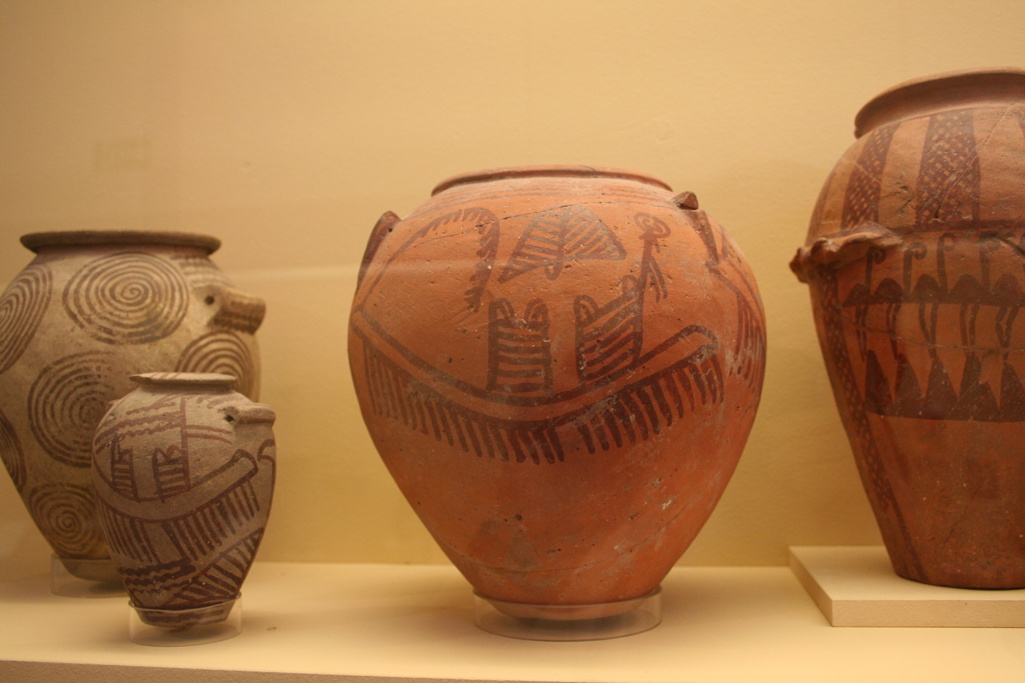 Dekorierte Keramik-Gefäße, Naqada II